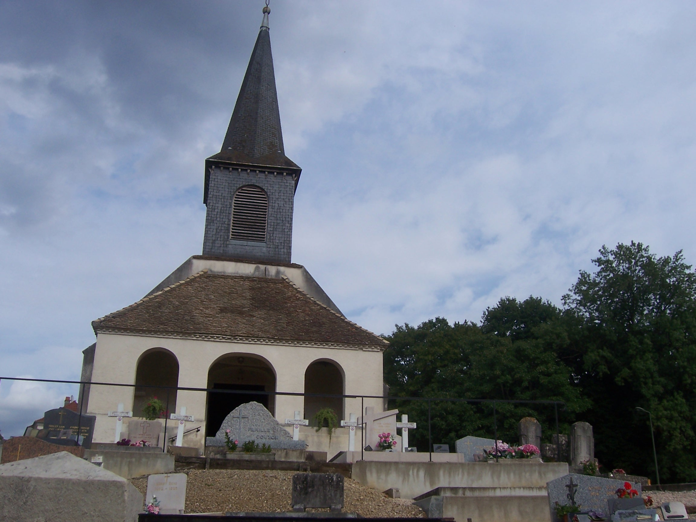 Eglise de Clux-Villeneuve